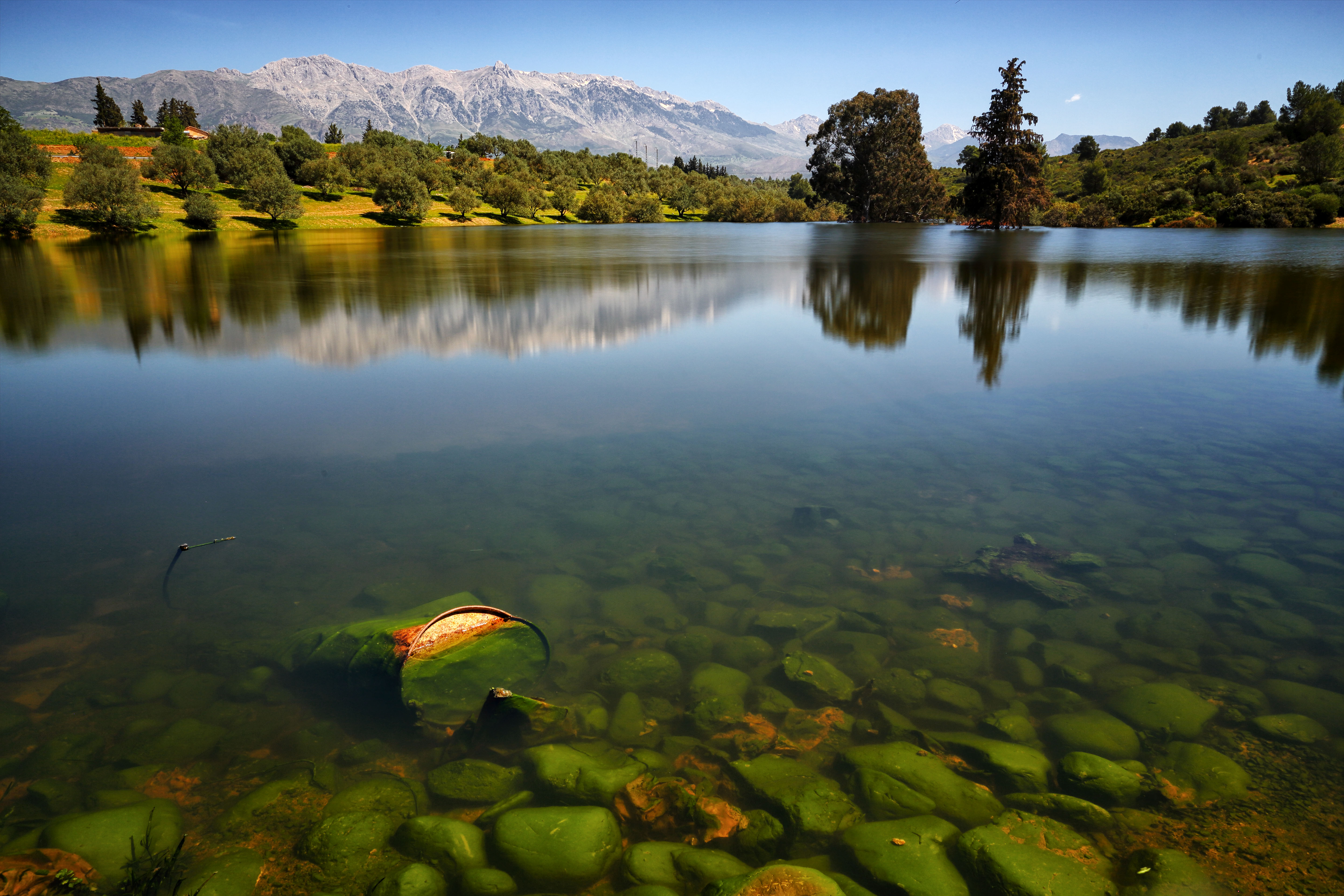 barrage bechloul Haïzer à Bouira